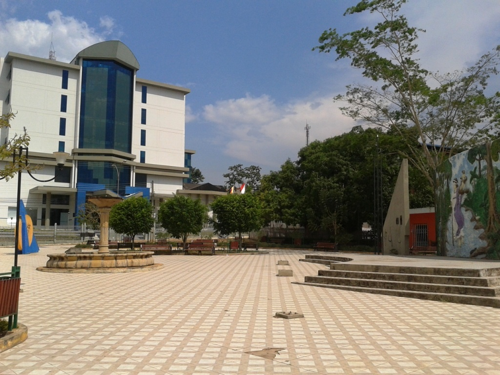 Plaza Judicial This medium shows the protected monument with the number N/00-010 in Bolivia.